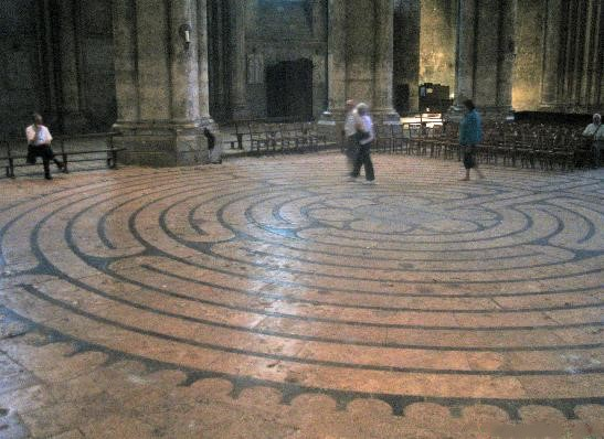 Das Labyrinth in der Kathedrale in Chartres